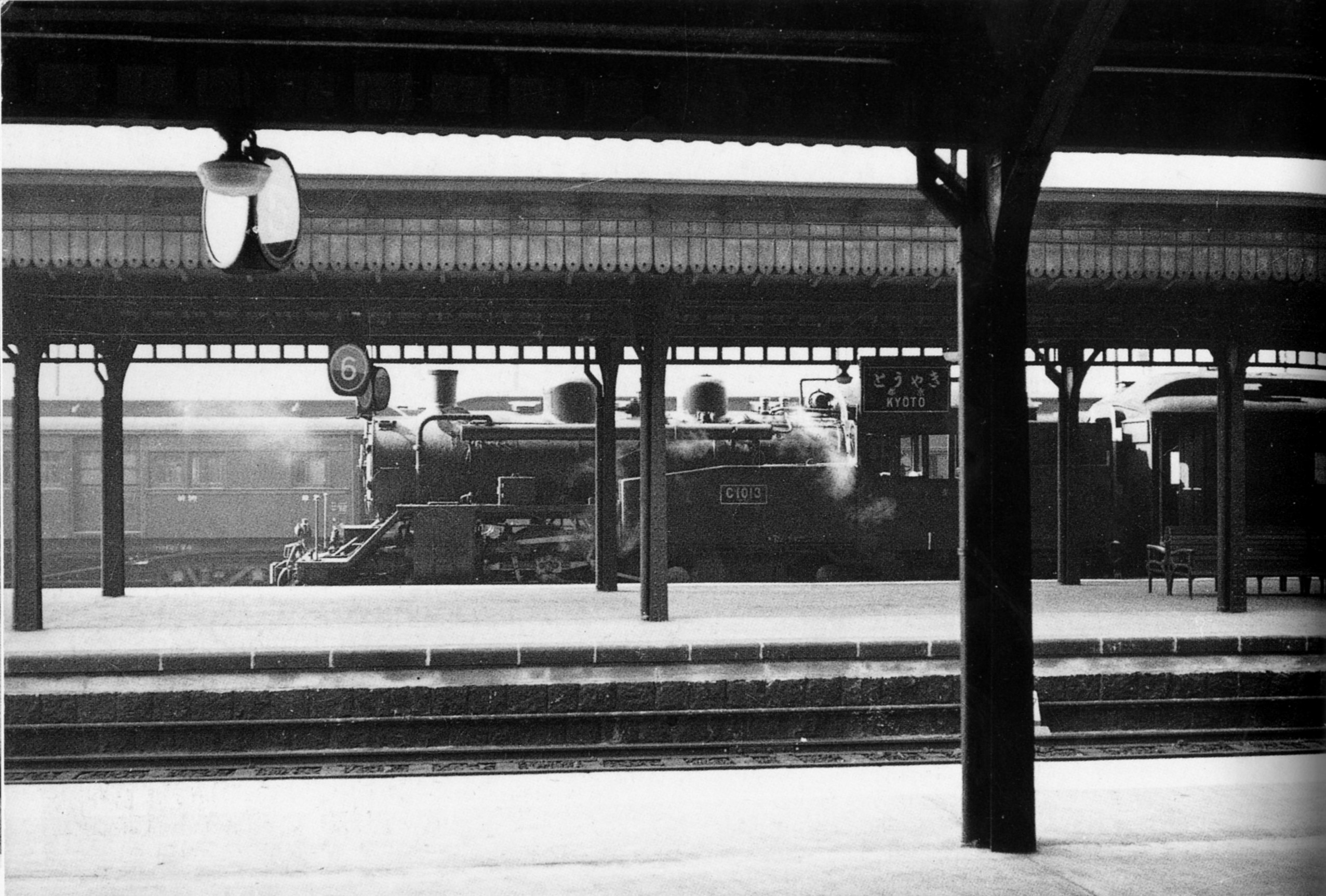 1938年(昭和13年)京都駅7番線で発車を待つC10形牽引奈良線旅客列車。